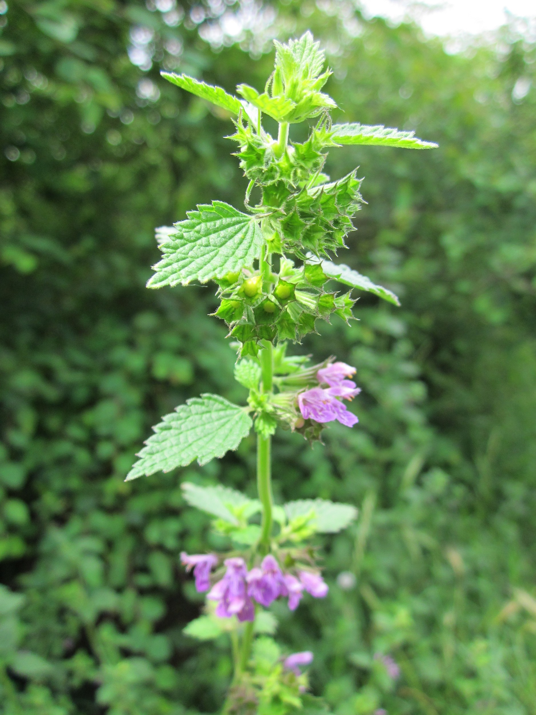 Schwarznessel (Ballota nigra) bei Hockenheim